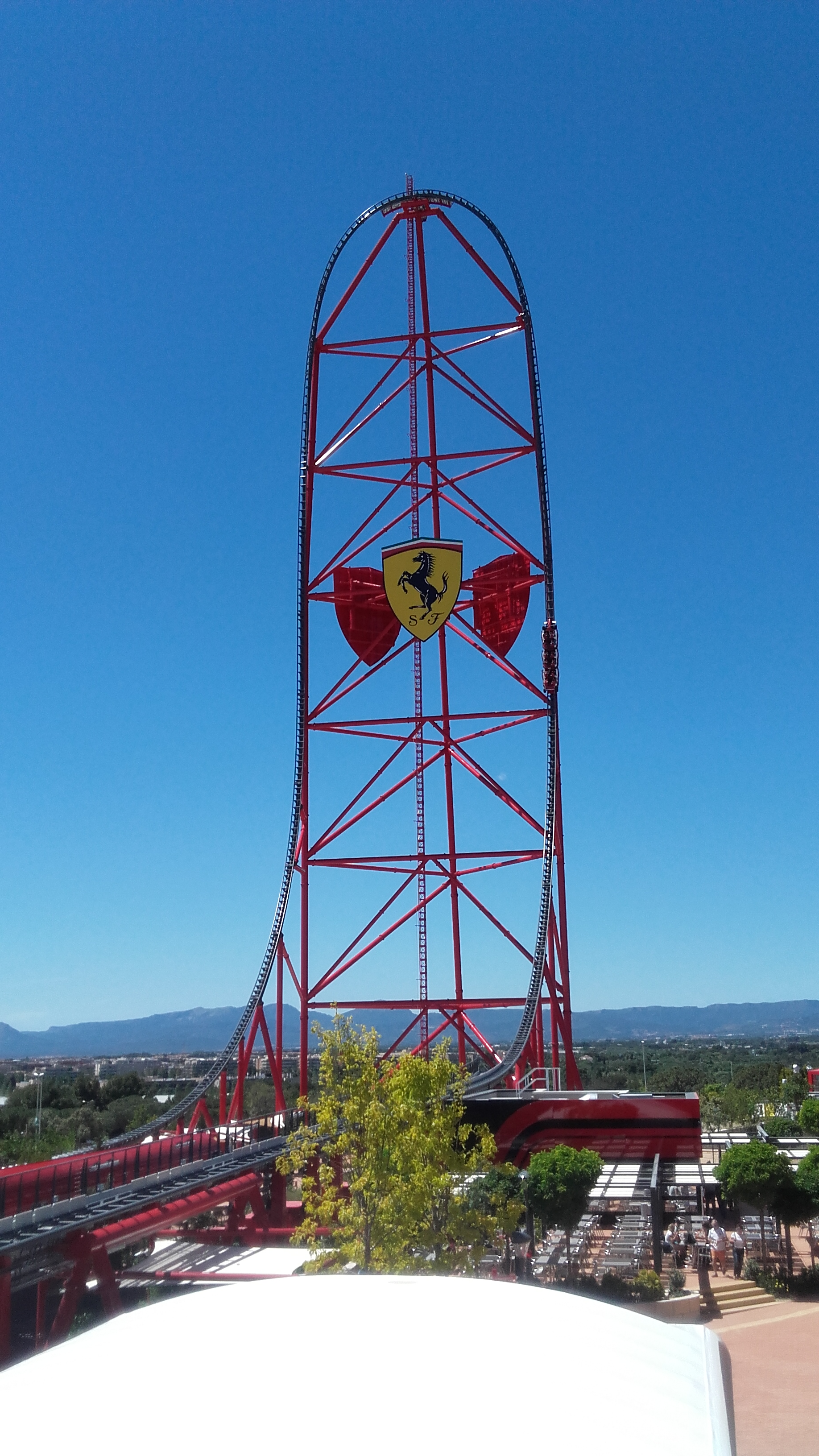 red force vu de face